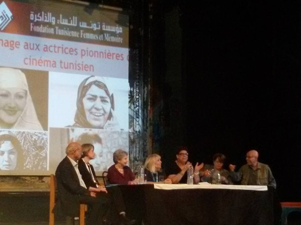 Noura Borsali présente Omar Khelifi (à droite) lors d'une table ronde autour des femmes pionnières du cinéma tunisien, organisée par la Fondation tunisienne Femmes et Mémoire en partenariat avec les JCC. Cinéma El-Hamra de Tunis, le 30 octobre 2016.